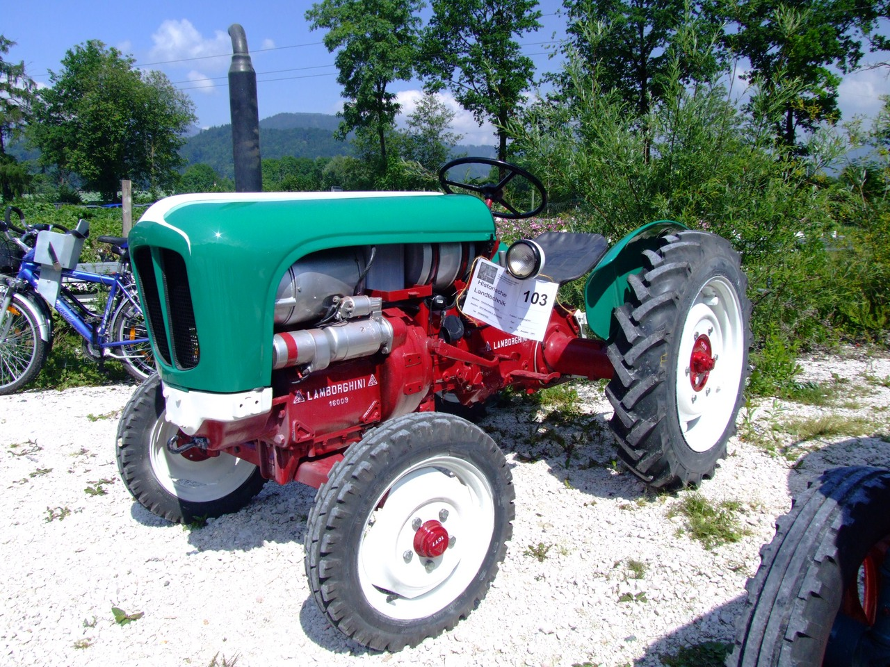 Lamborghini-Traktor Lamborghinetta Baujahr 1957